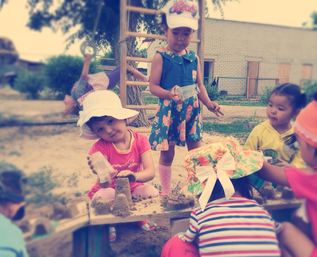 Сағашилі балабақшасы